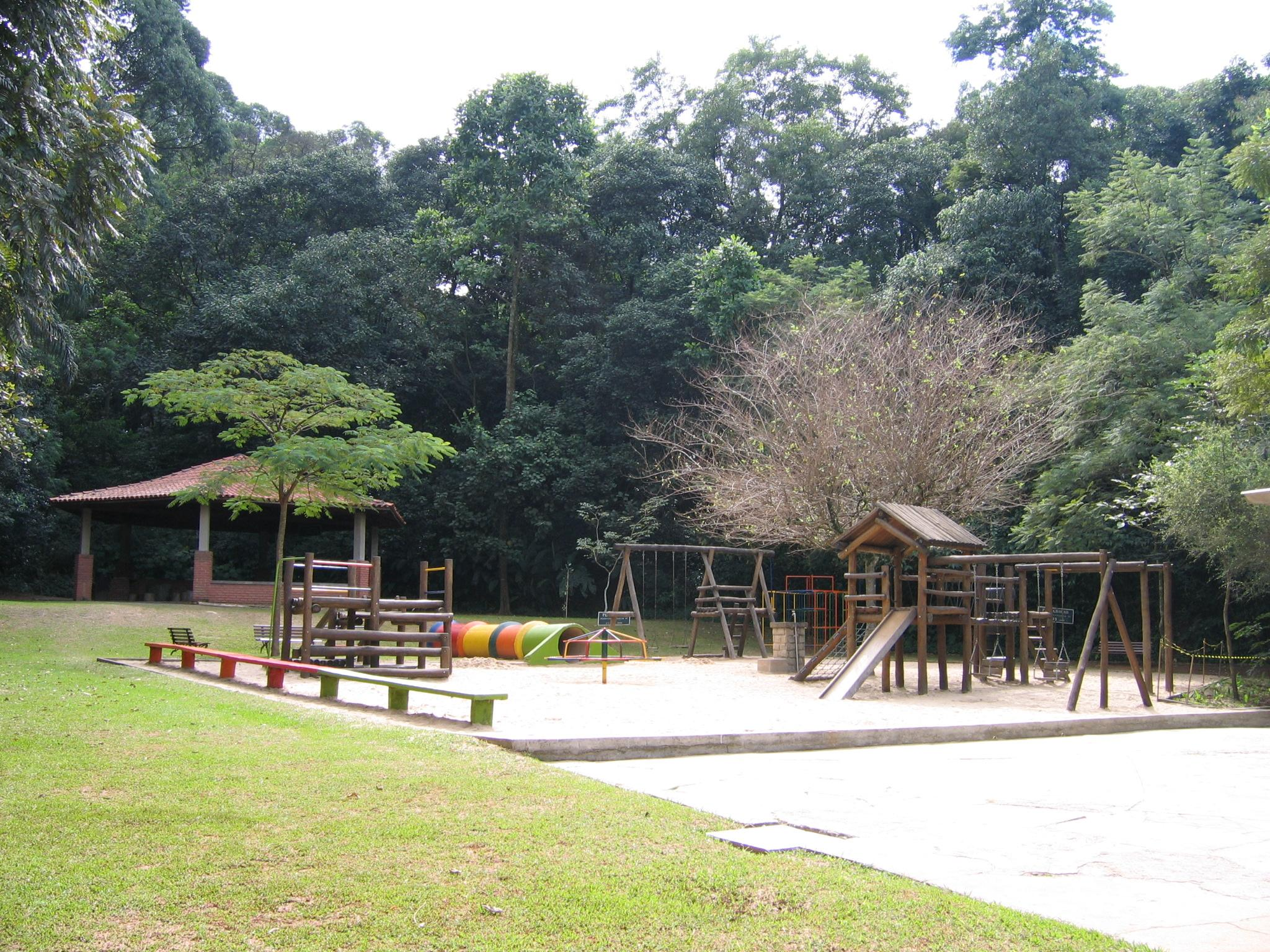 Playground do piso superior do Parque Luís Carlos Prestes e um dos locais de pic-nic.